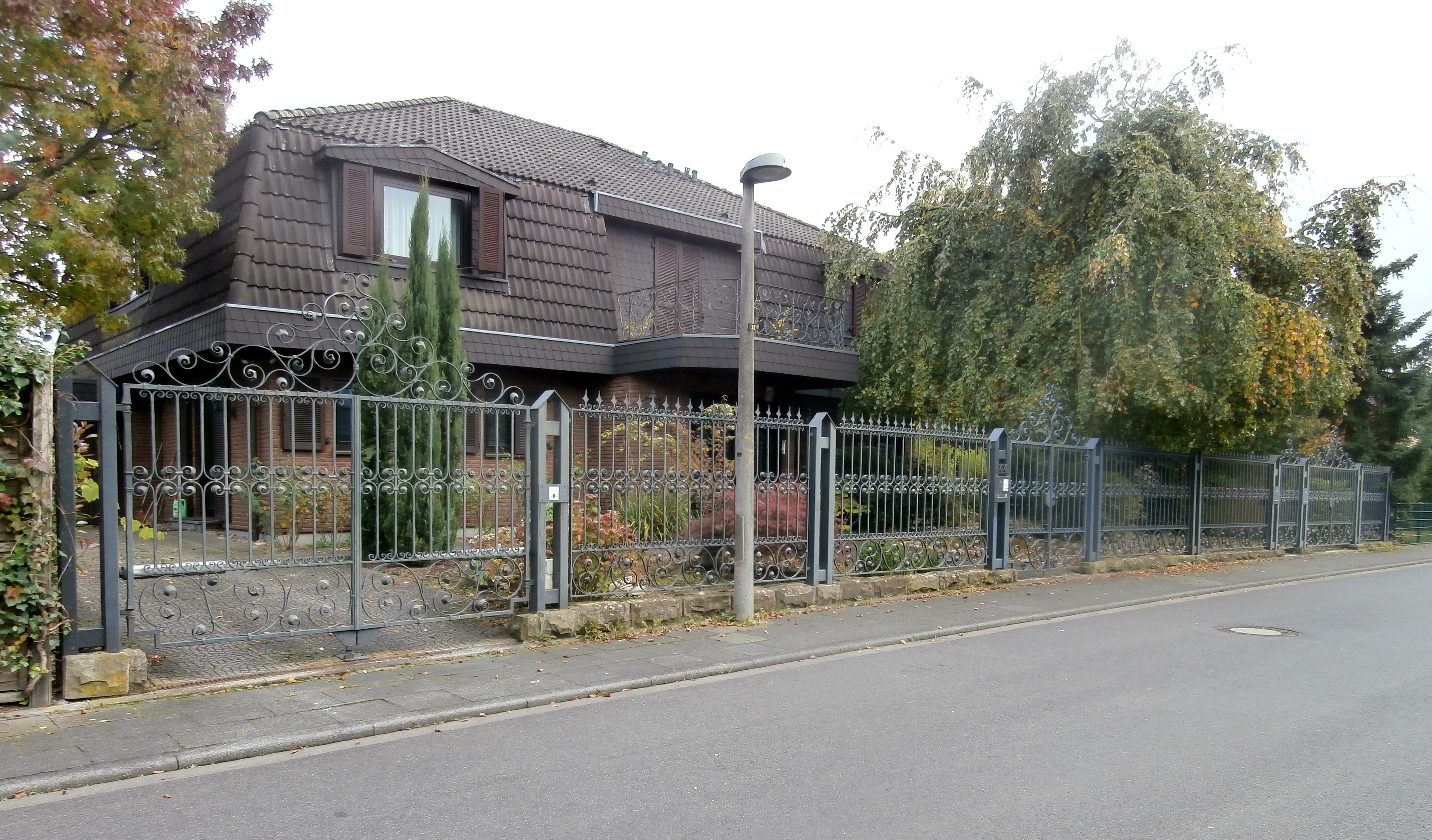 Ehemalige Residenz des polnischen Botschafters, Am Waldpark 44, Köln-Hahnwald